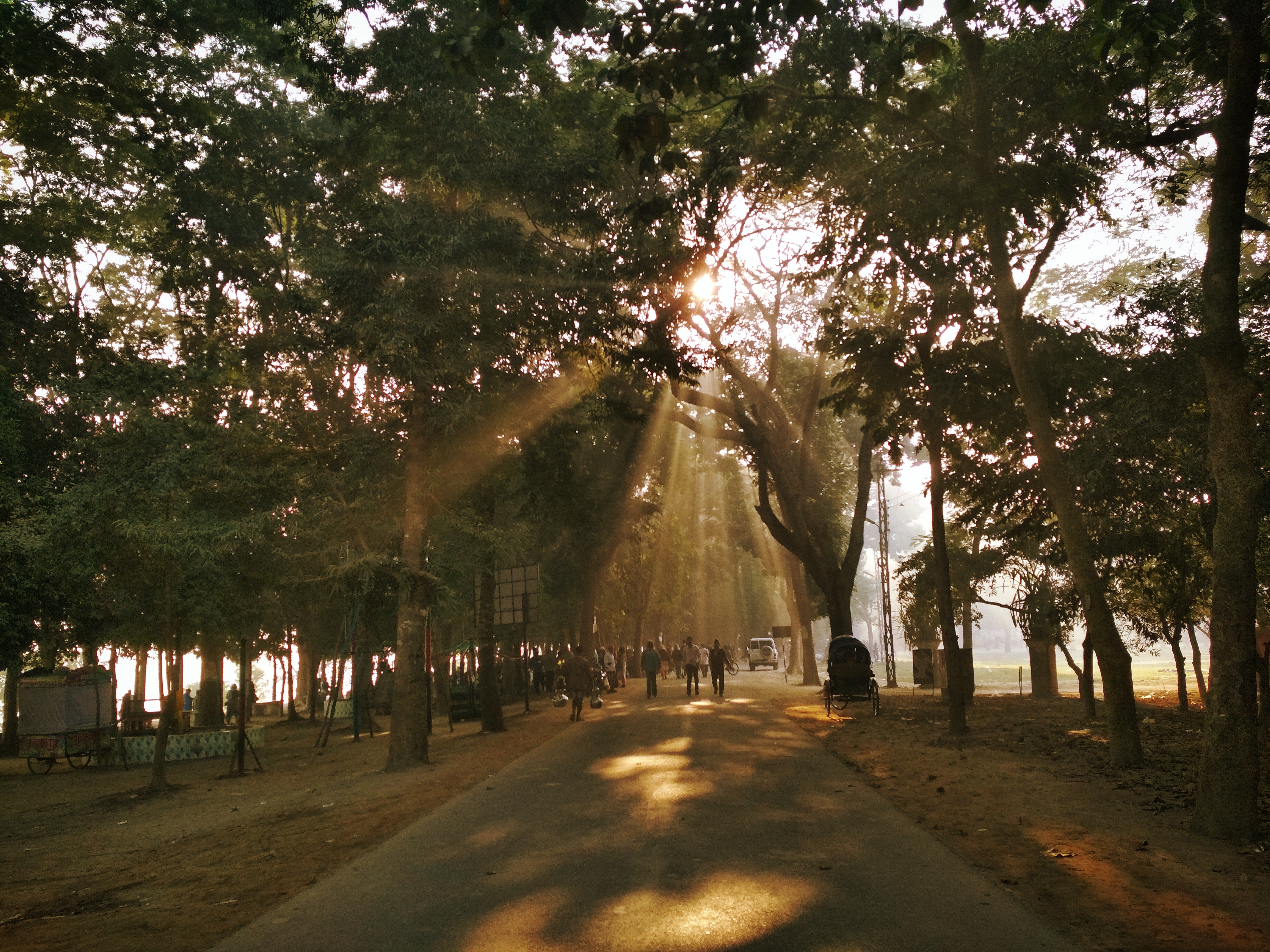 জয়নুল উদ্দ্যানে শীতের সকাল